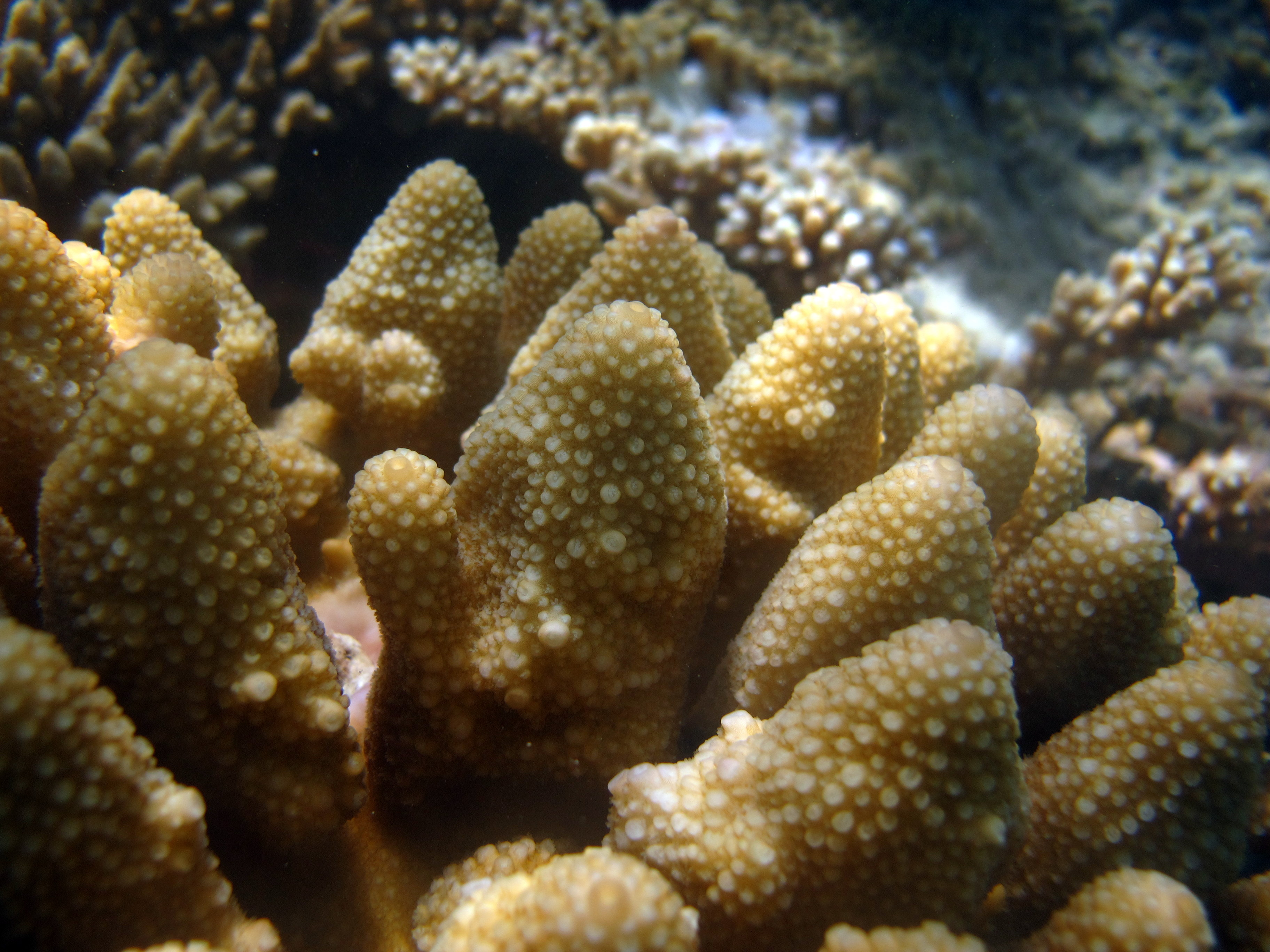 Gros plan sur du corail Acropora monticulosa aux Maldives (atoll de Baa).